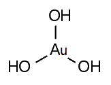 Formula di struttura dell'acido/idrossido aurico La molecola è planare (es: acido borico)